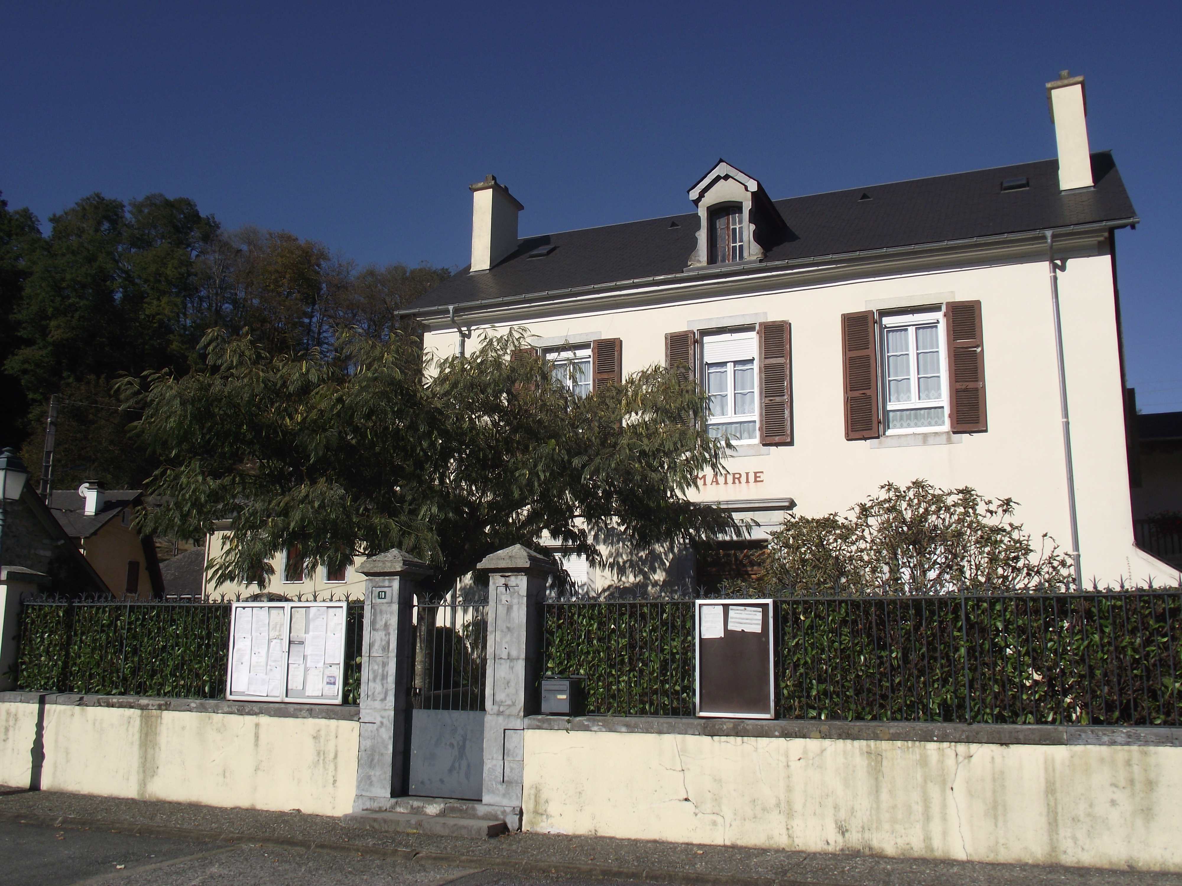 Mairie de Peyrouse (Hautes-Pyrénées, France)